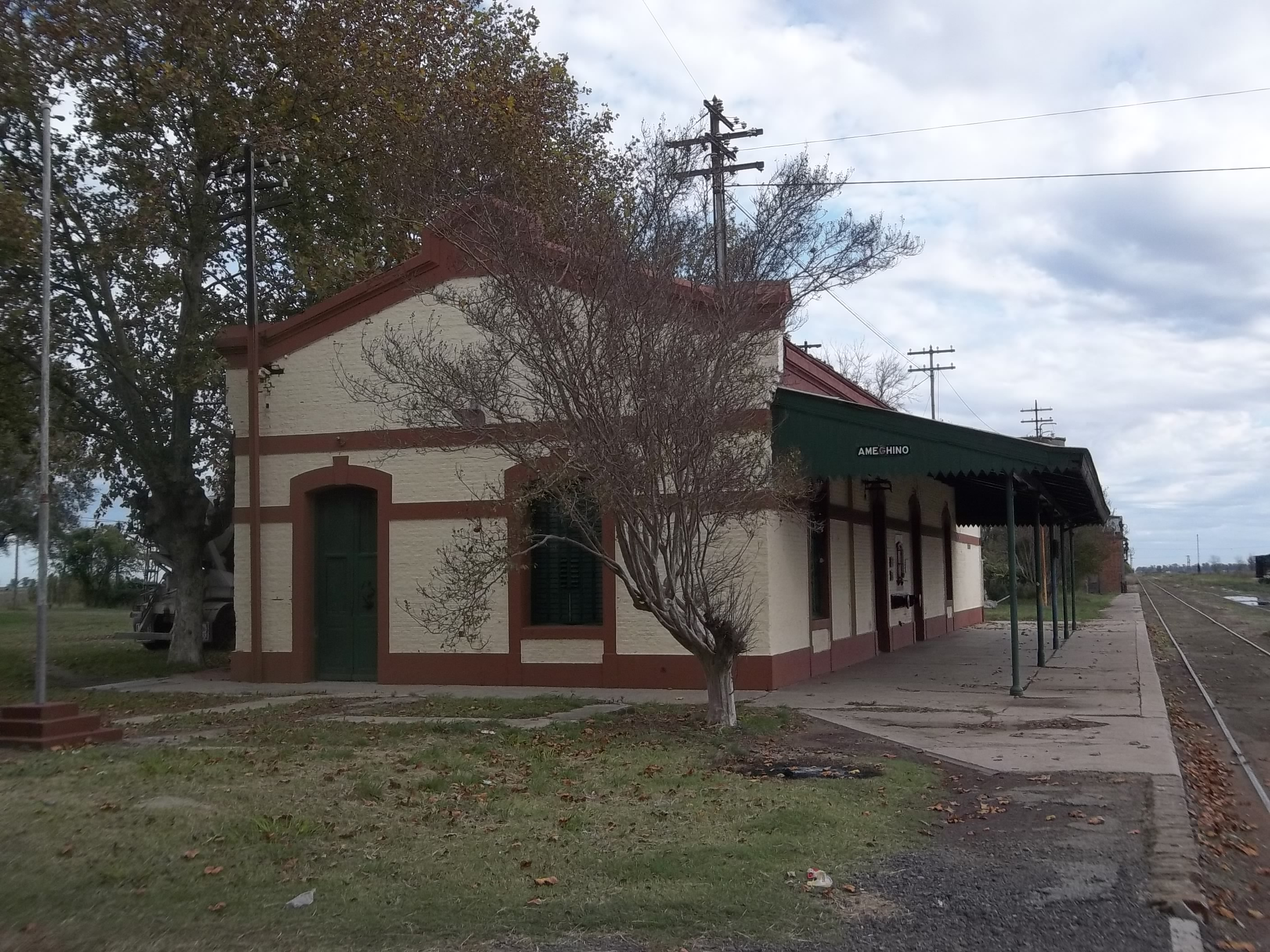 Estación Ameghino, ubicada en la localidad de Ameguino, partido de Florentino Ameghino, provincia de Buenos Aires, República Argentina